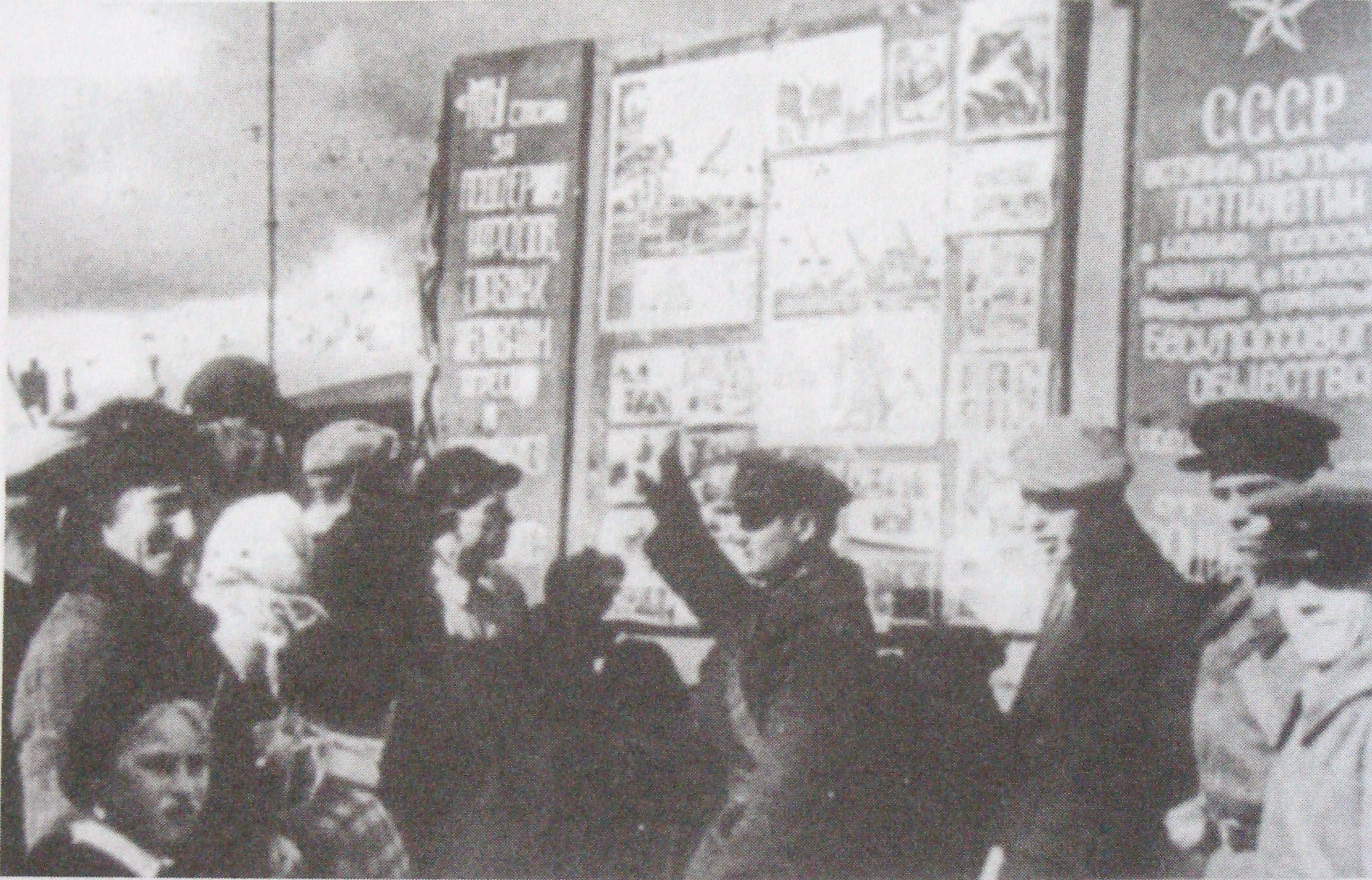 Paźdzniernik 1939. Smorgonie. Politruk demonstruje zgromadzonym przechodniom osiągnięcia sowieckiej gospodarki.